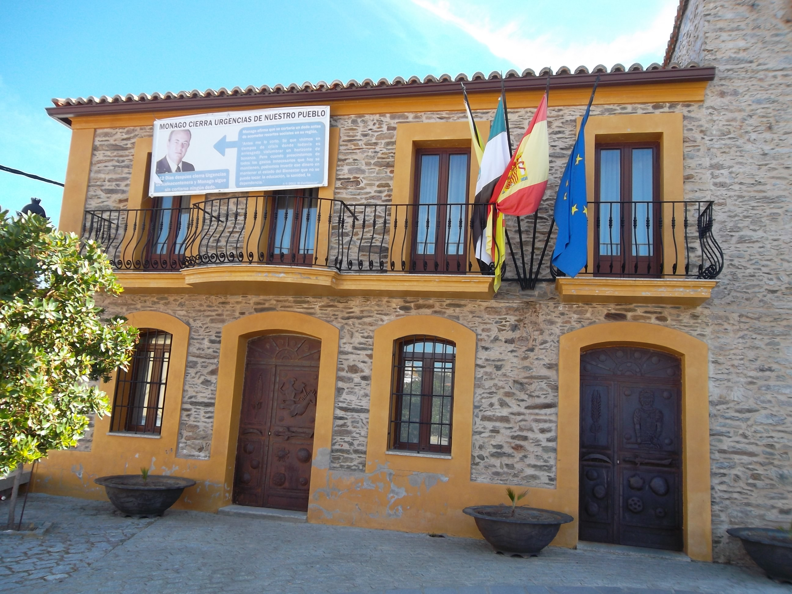 El ayuntamiento de Aldeacentenera un pueblecito de la provincia de Cáceres en Extremadura, España.